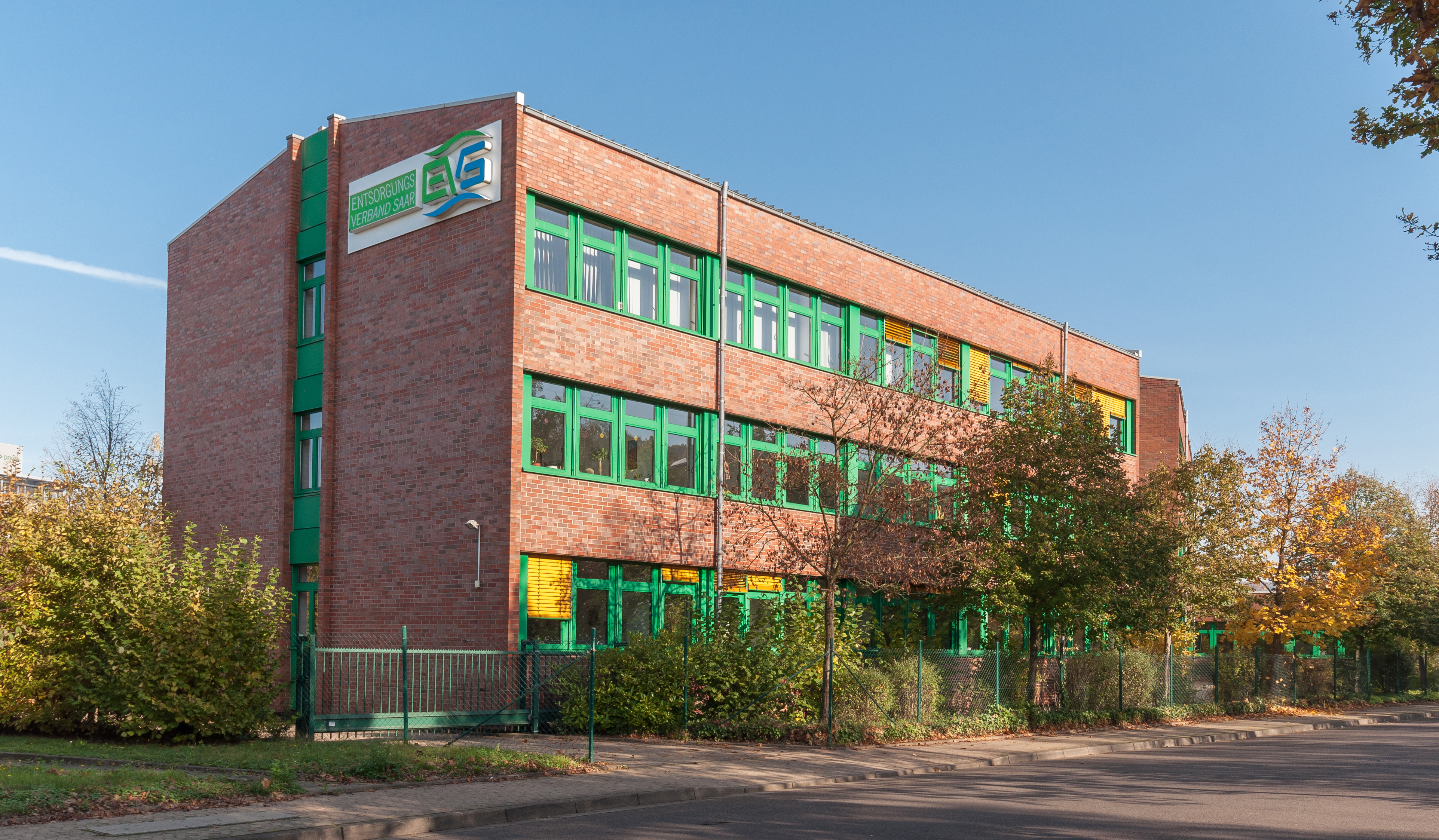 Entsorgungsverband Saar (EVS) im Industriegebiet Süd, Saarbrücken.